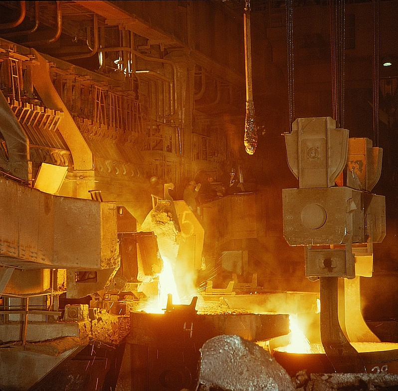 Original image description from the Deutsche FotothekMetallurge für Hüttentechnik